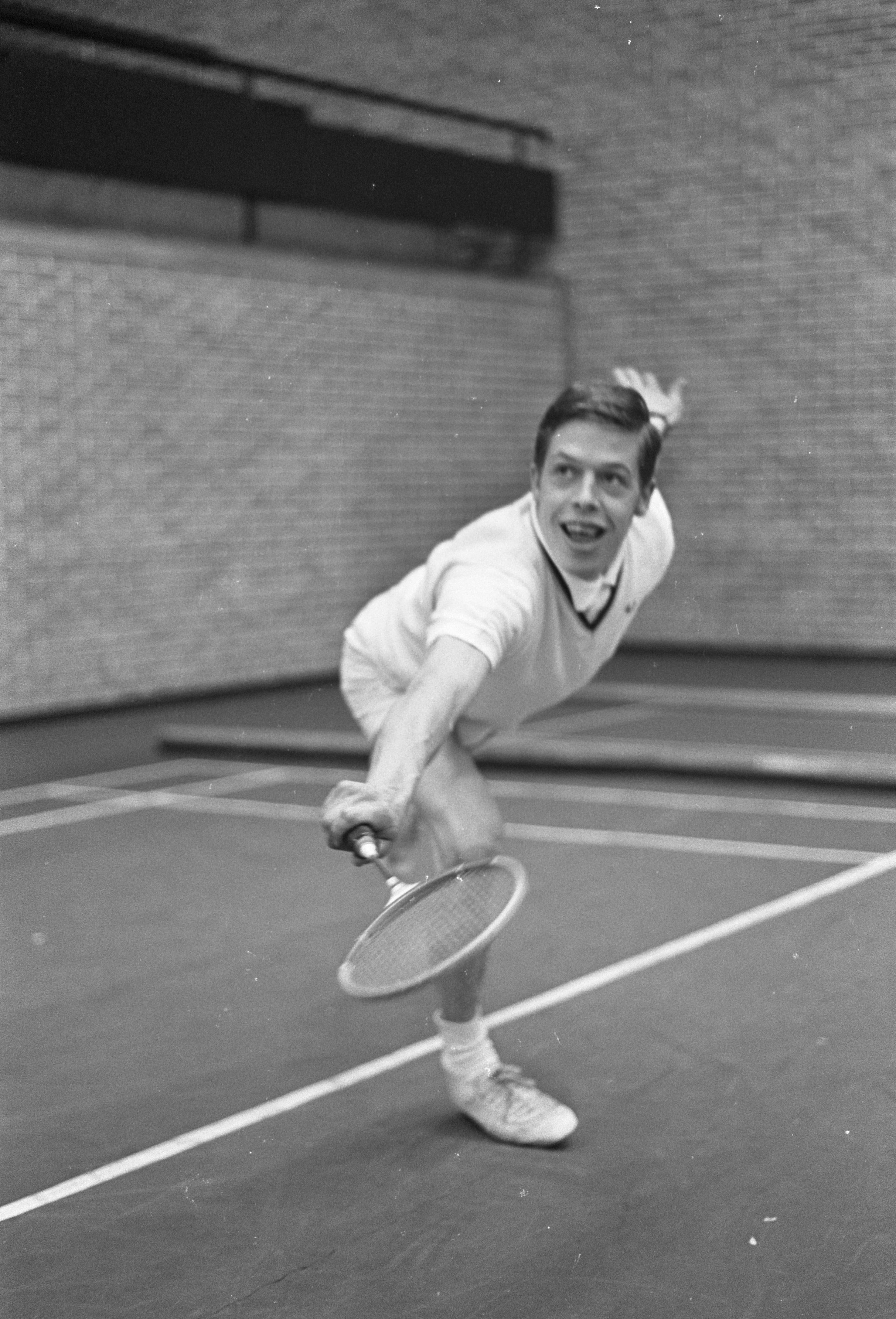 Collectie / Archief : Fotocollectie Anefo Reportage / Serie : [ onbekend ] Beschrijving : B. Ridder in aktie badminton Datum : 2 april 1968 Trefwoorden : BADMINTON Persoonsnaam : B. Ridder Fotograaf : Kroon, Ron / Anefo Auteursrechthebbende : Nationaal Archief Materiaalsoort : Negatief (zwart/wit) Nummer archiefinventaris : bekijk toegang 2.24.01.05 Bestanddeelnummer : 921-2205